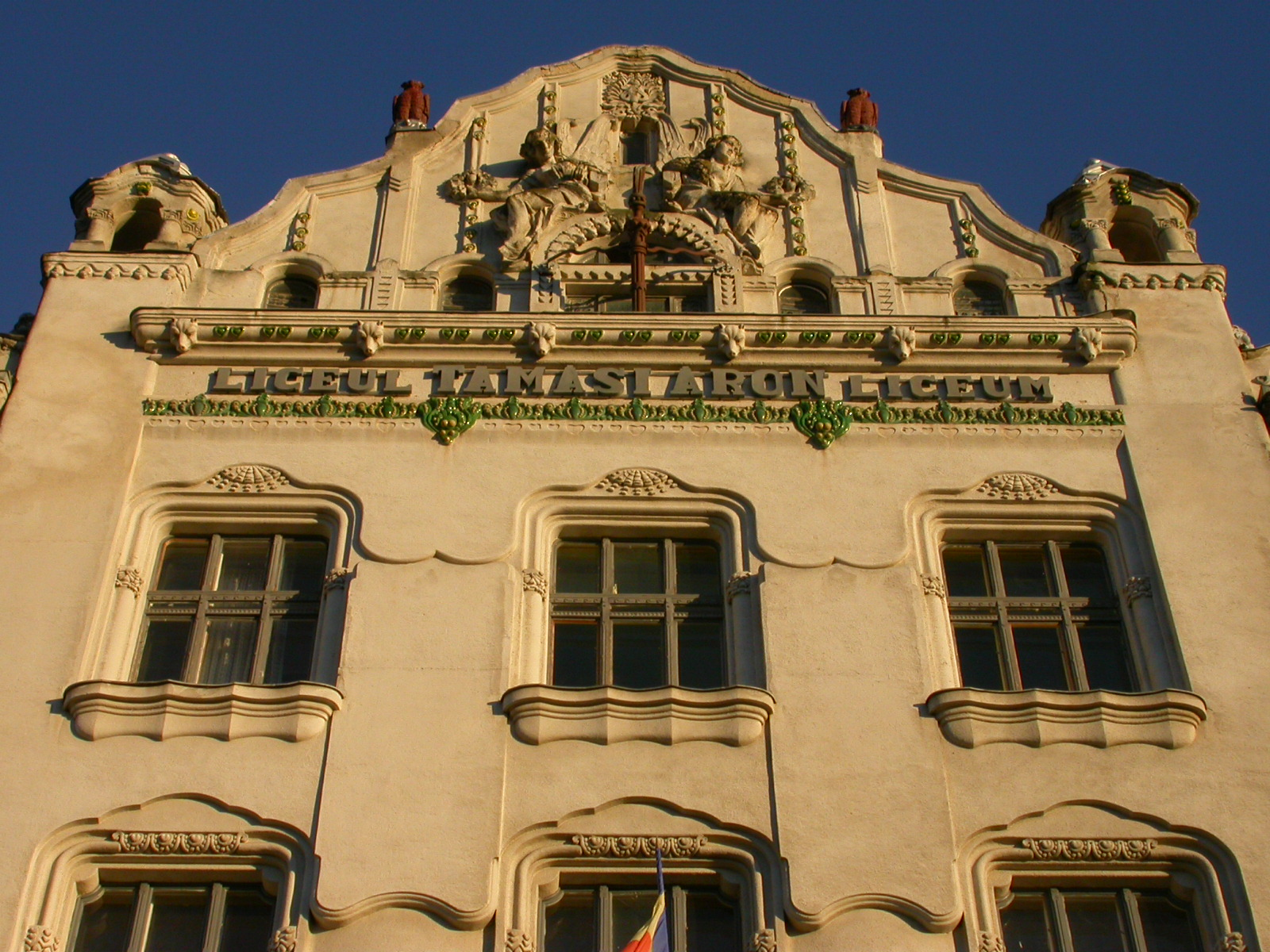 Fostul gimnaziu catolic, azi Liceul teoretic "Tamási Áron" 1912